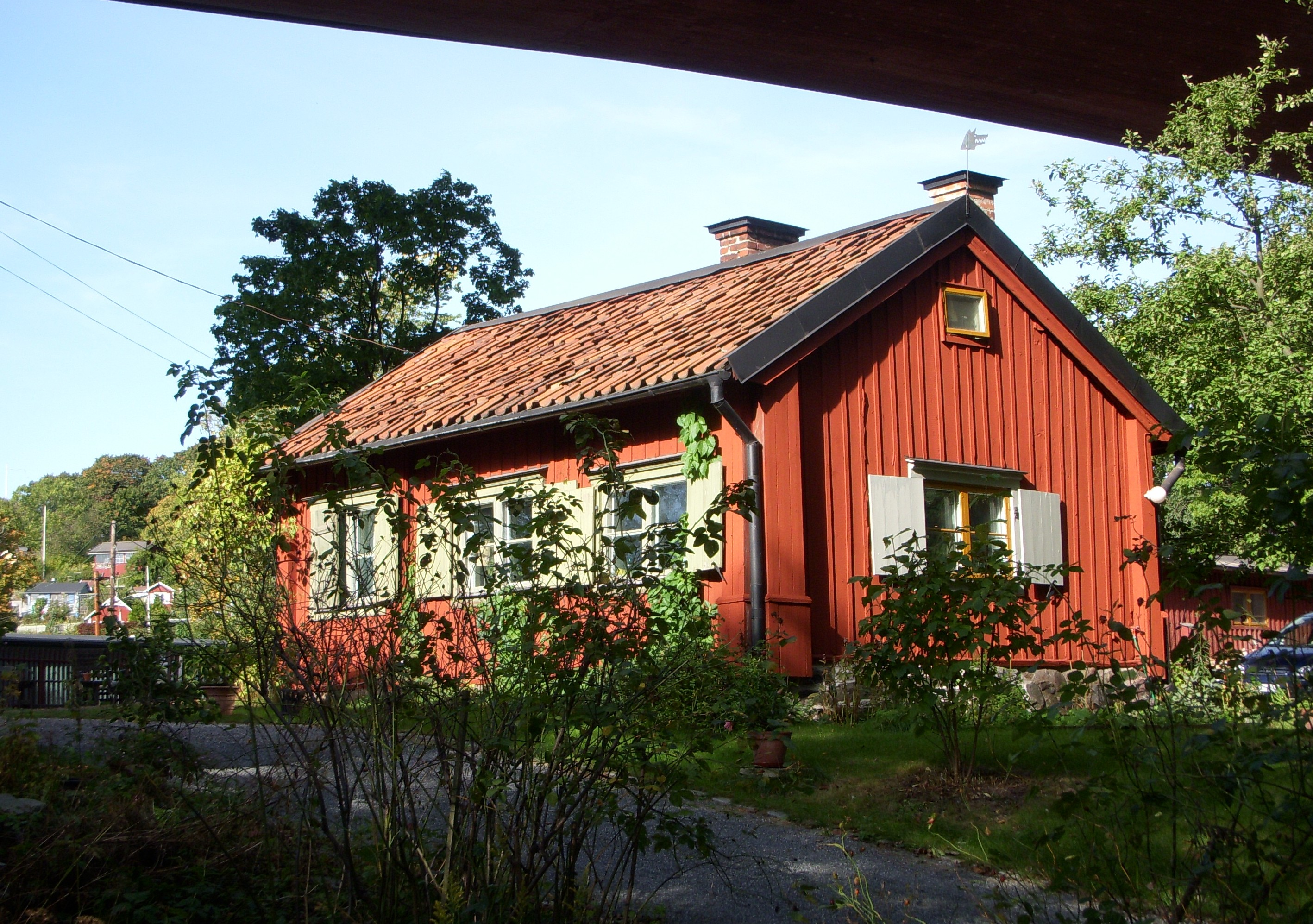 Molitors malmgård på Södermalm, uthuset